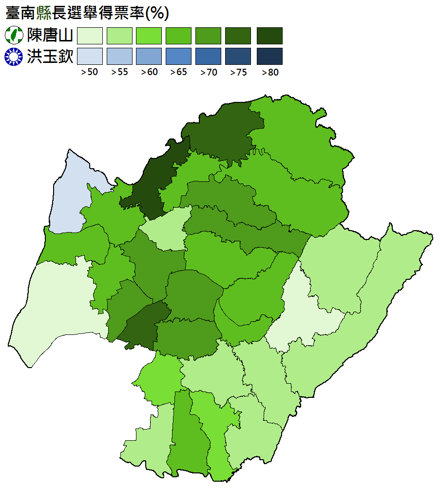 1997年臺南縣長選舉